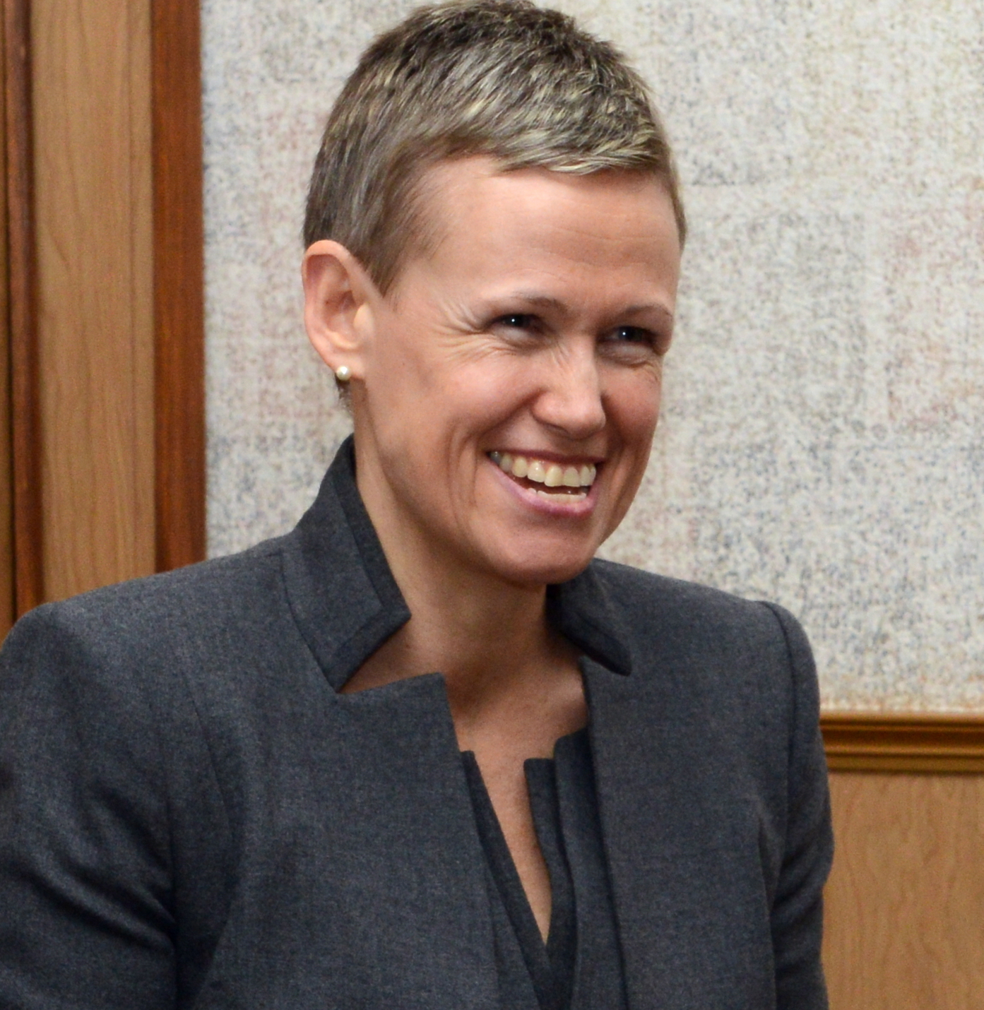 Alice Walpole, ambassadrice du Royaume-Uni à Luxembourg Le 18 décembre 2014, sur initiative de l'ambassade du Royaume-Uni, une délégation de diplomates visita le couvent de Cinqfontaines. Entre 1941 et 1943 ce site servait à l'occupant allemand de camp d'internement de la population juive. La délégation fut accueillie par le Père Jean-Jacques Flammang de la Congrégation des prêtres du Sacré-Coeur qui offrit le petit déjeuner et présenta le couvent. Lors d'une visite des lieux, l'historien Marc Schoentgen décrivit les conditions de vie extrêmes des personnes internées qui furent transférées par après vers les camps de concentration d’Auschwitz, de Theresienstadt (Térézin), de Litzmannstadt (Lodz) et d’Izbica. L'architecte Christoph Rosenberg présenta le projet d'un «Centre de rencontre et de mémoire de la Shoah» à cet endroit historique et Henri Juda, président de MemoShoah, détailla en profondeur le concept, qui a le support de la Congrégation des prêtres du Sacré-Coeur. La délégation se rendit ensuite à Marnach au Cube 521 où elle fut accueillie par la directrice Odile Simon qui présenta le Centre culturel et invita à un déjeuner campagnard. L'historien Paul Dostert y retraça l'histoire de la persécution de la population juive luxembourgeoise pendant la Seconde Guerre mondiale et informa des récentes découvertes historiques à ce sujet.